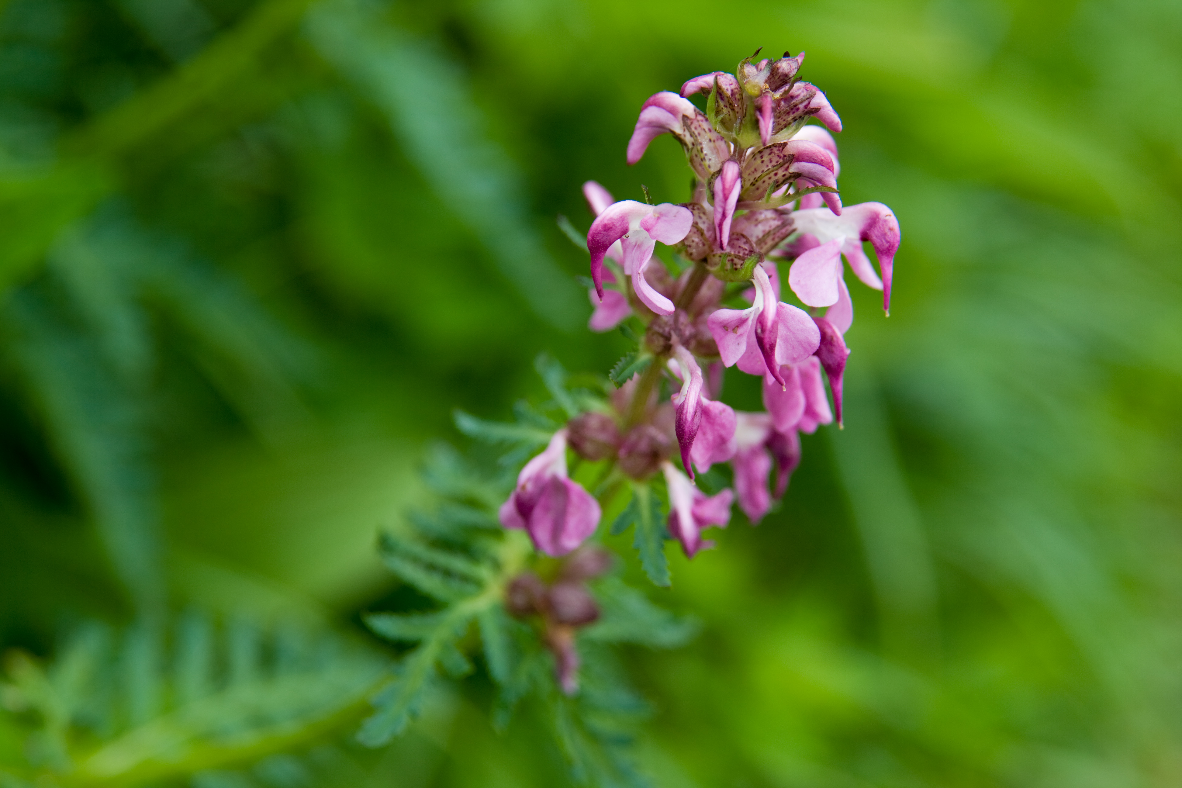 ヨツバシオガマ (学名:Pedicularis chamissonis var. japonica)